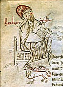 Hugues II de Spolète